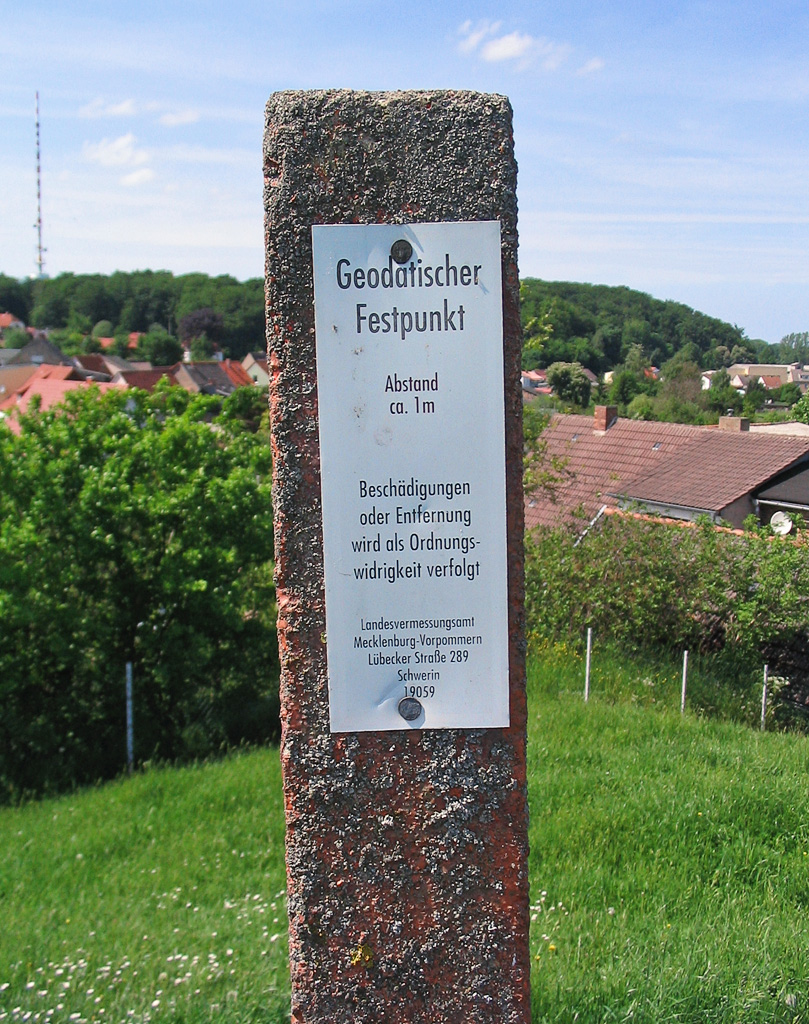 Beschreibung: Geodatischer Festpunkt Fotograf: Darkone, 29. Mai 2005